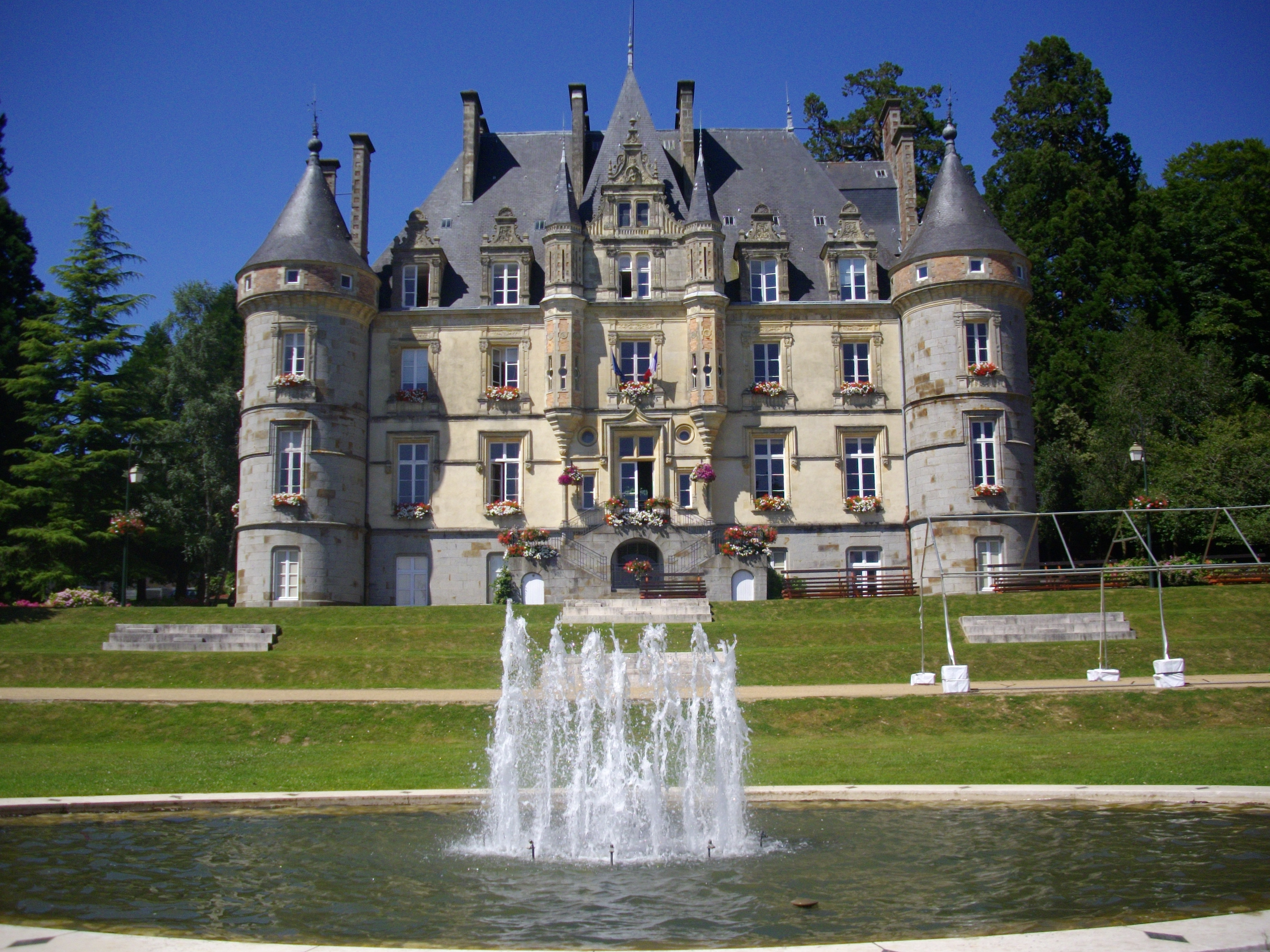 Château et Hôtel de Ville de Bagnoles-de-l'Orne, Bagnoles-de-l'Orne (Basse-Normandie, France)